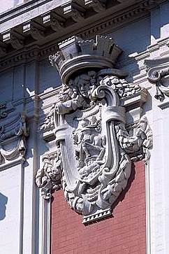 Reggio Calabria, particolare liberty raffigurante lo stemma cittadino (San Giorgio che uccide il drago) sul palazzo dell'Intendenza di Finanza